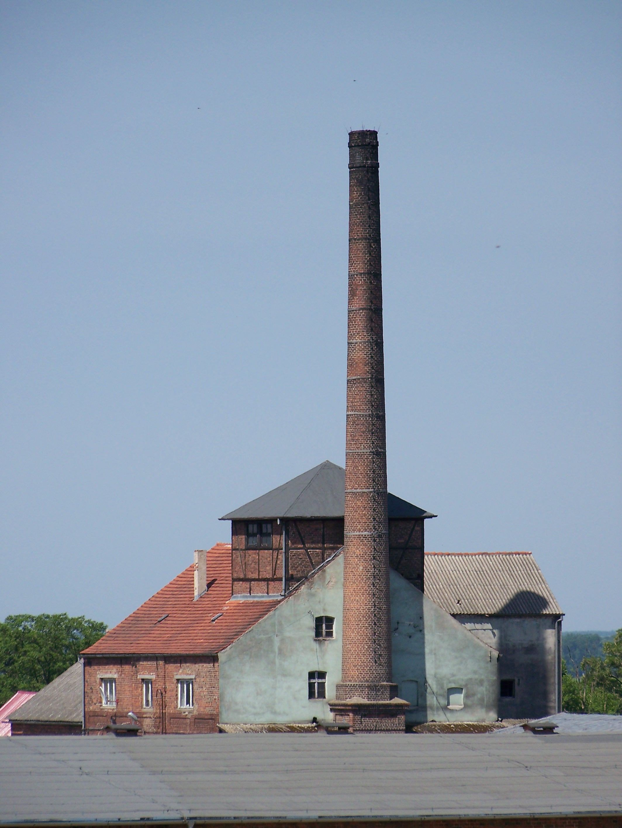 Gorzelnia w Bieganowie